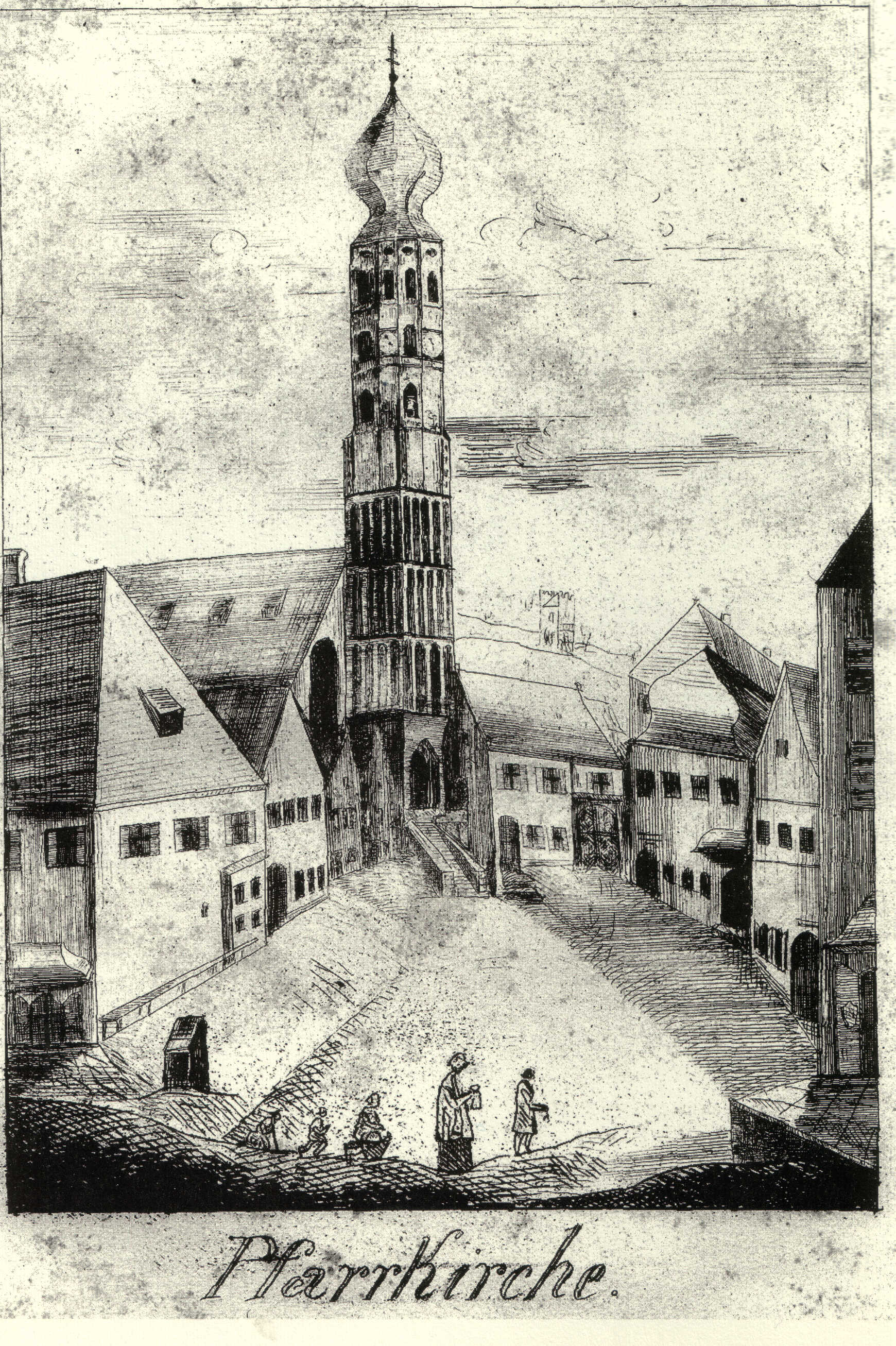 Ansicht der Stadtpfarrkirche St. Johannes in Dingolfing. (Mitte 19. Jh.)